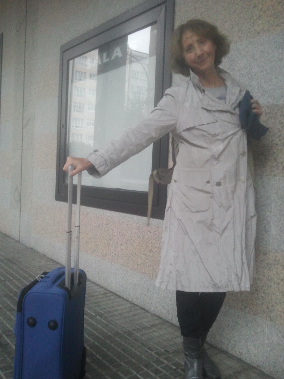 A actriz Mabel Rivera nunha entrevista no 2013.